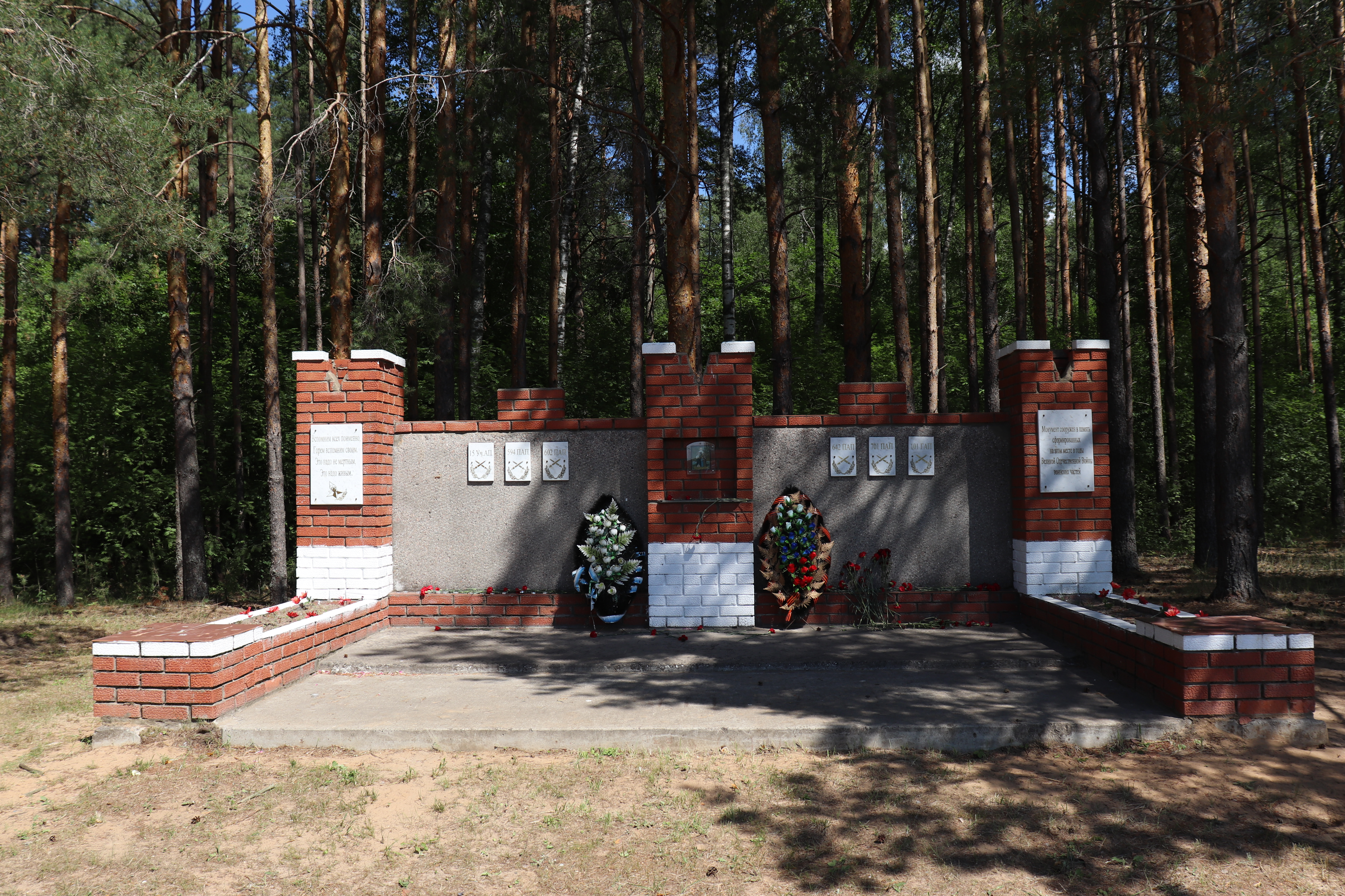 Мемориал памяти о сформированных на Шуйской земле войсковых частях: 15-м учебном, 594-м, 602-м, 642-м, 701-м пушечных и 101-м гаубичном артиллерийским полкам.